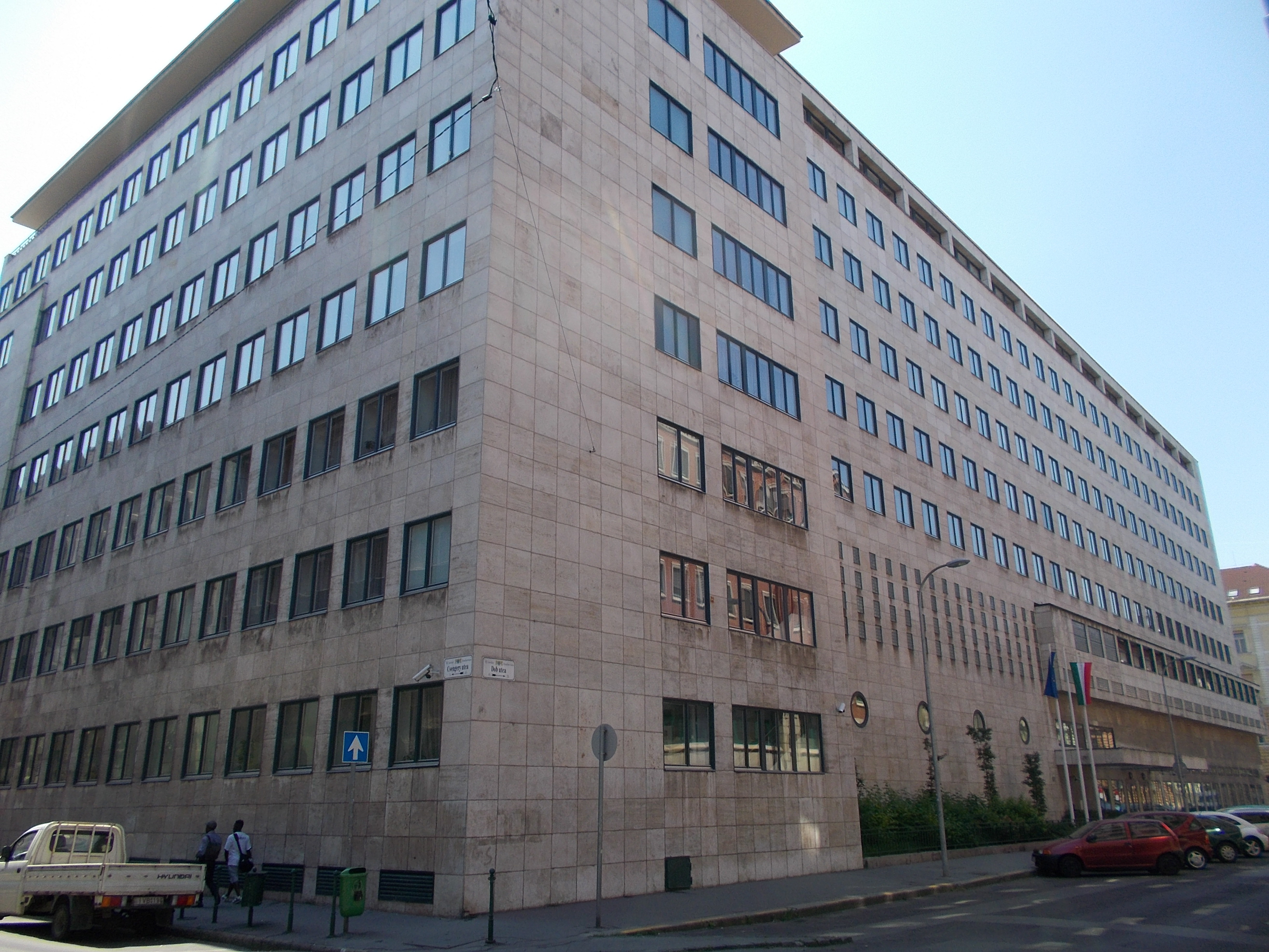 A volt Közlekedési, (Építési) és Hírközlési Minisztérium épülete. Most Bélyegmúzeum és Adóhatósági irodák. Műemlék ID 826 Csengery János utca utca sarkán. - Budapest, VII. Dob utca 75-81., Hársfa utca 47., Csengery János utca 14-16. GPS 47.502869, 19.069597 This is a photo of a monument in Hungary, Identifier: 826